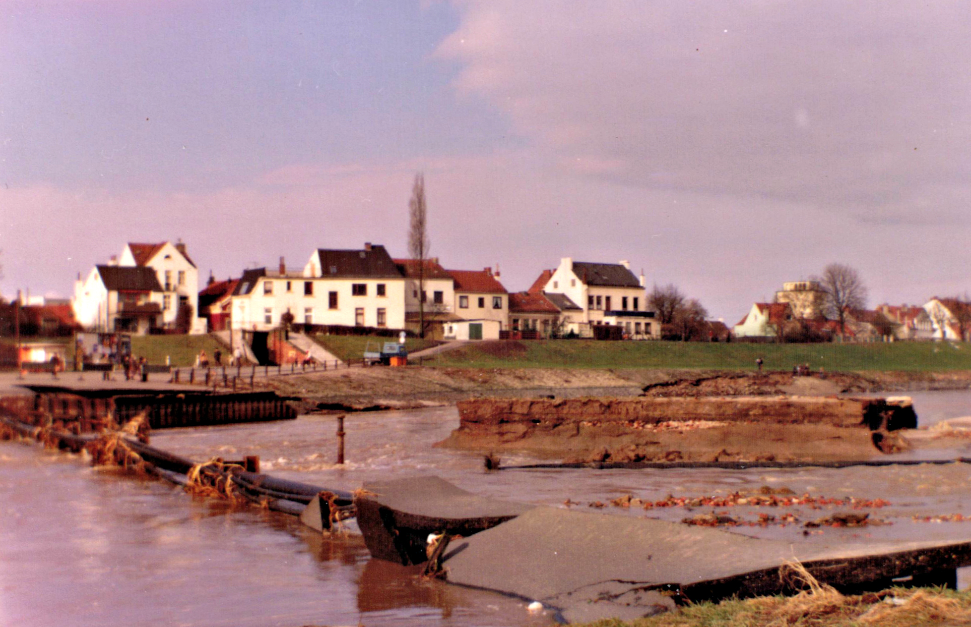 Durchbruch der Landbrück Höhe Deichschart Nähe Kirchweg